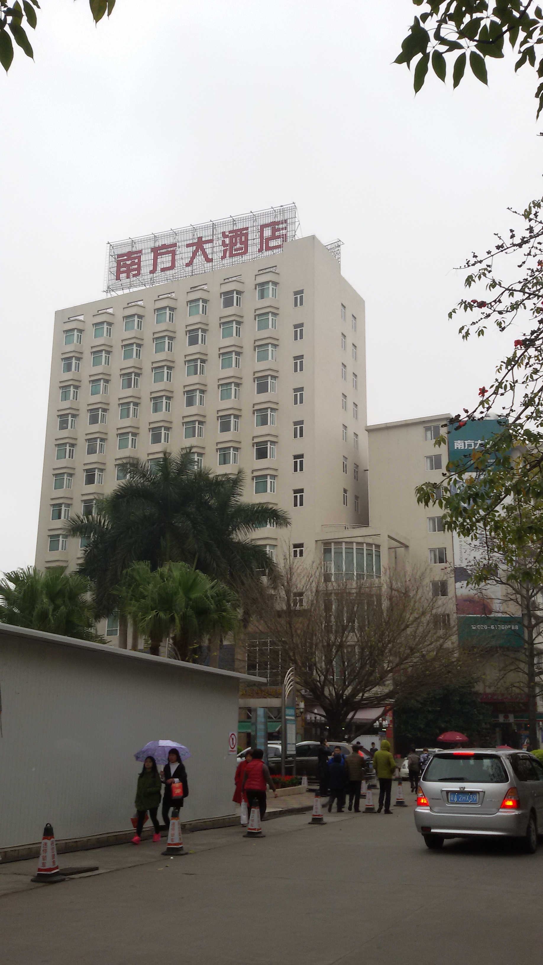 粵語: 廣州南方大酒店